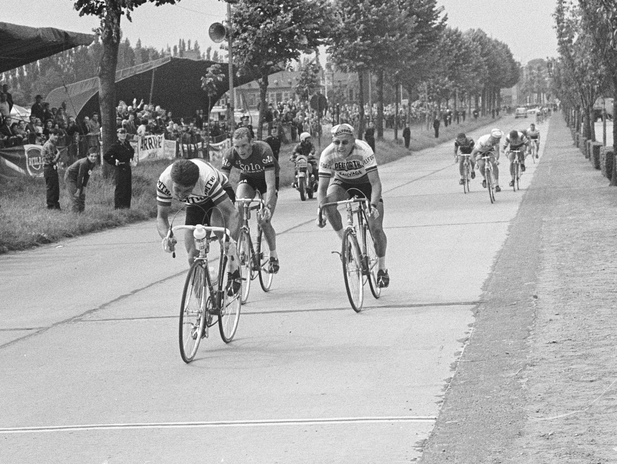 Tour de France , finish te Doornik, voorop Reybroeck (1), links Sels (3) en rechts Jan Janssen (2).